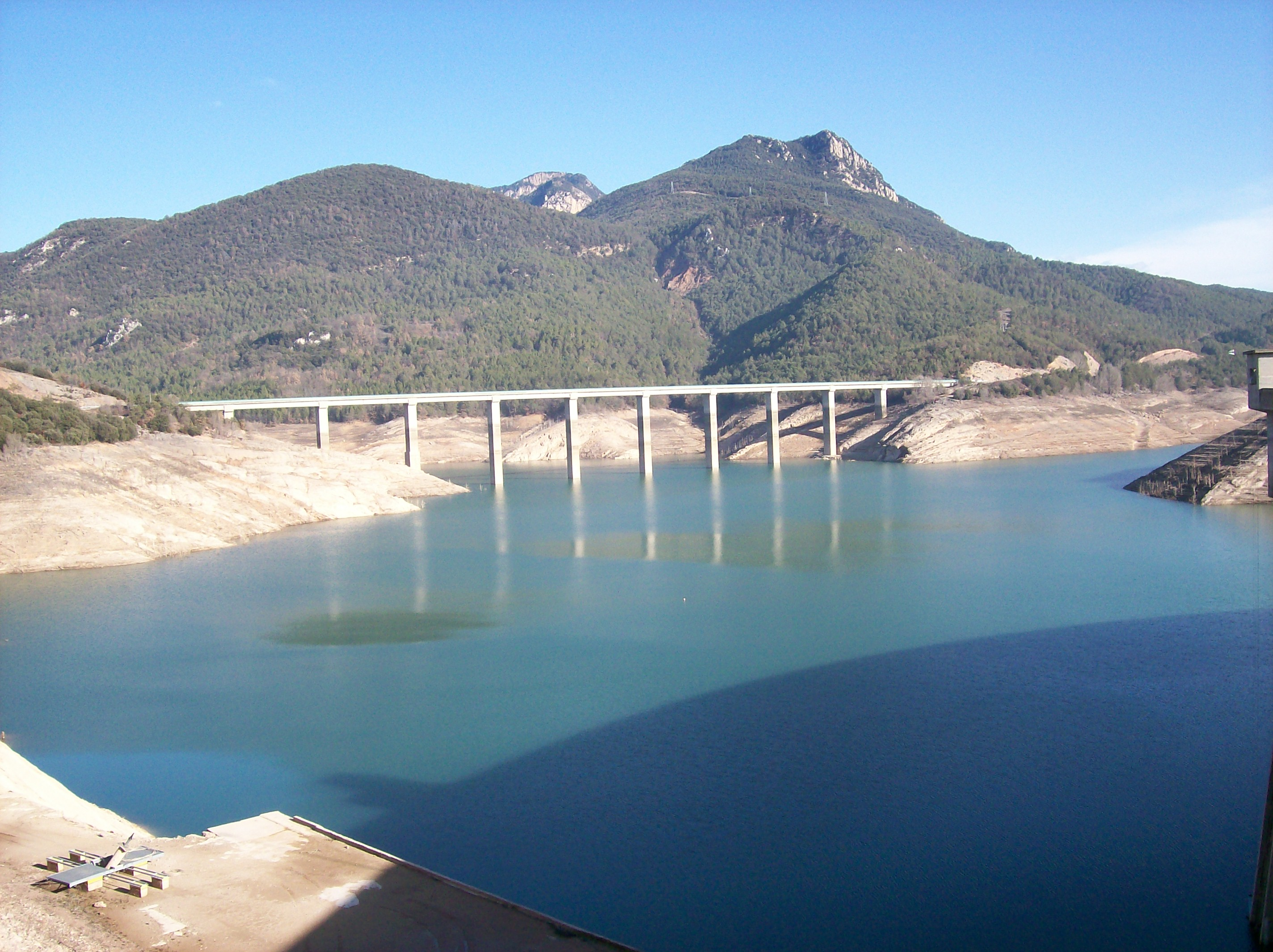 Pantà de la Baells